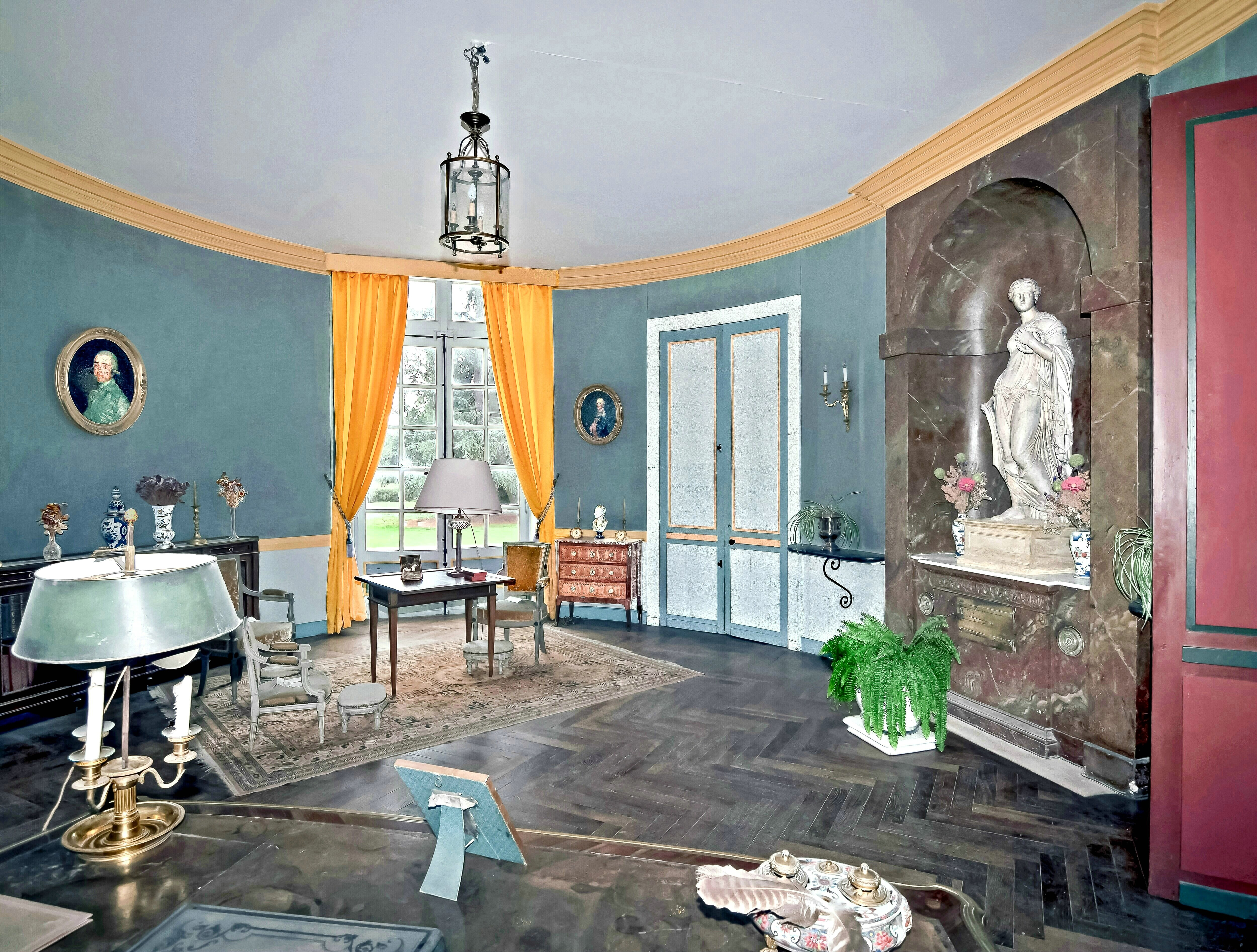 Schloss Villesavin, der Salon